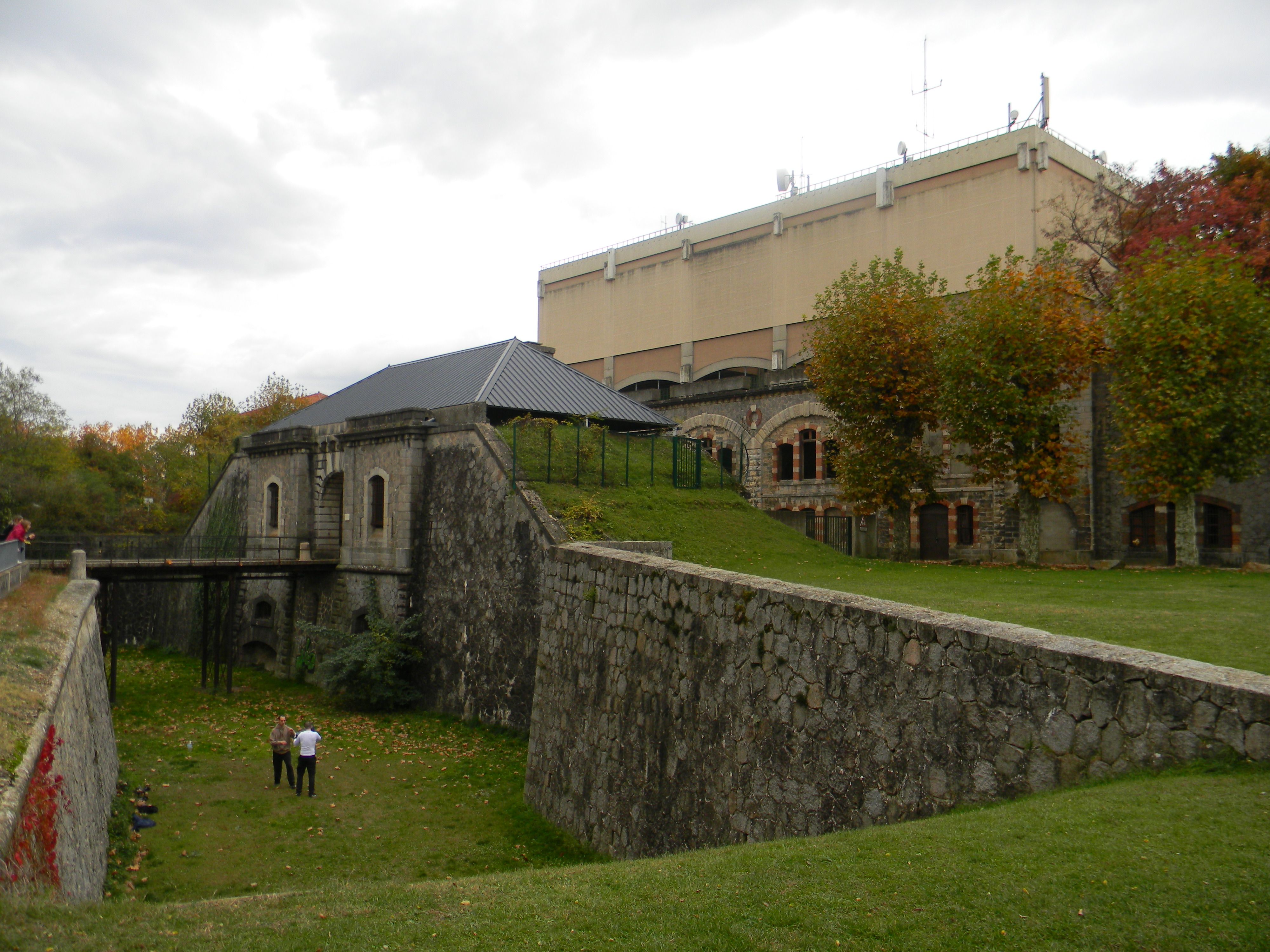 Le Fort de Côte-Lorette. Le bâtiment rose au dessus est un château d'eau ajouté ultérieurement par la commune.